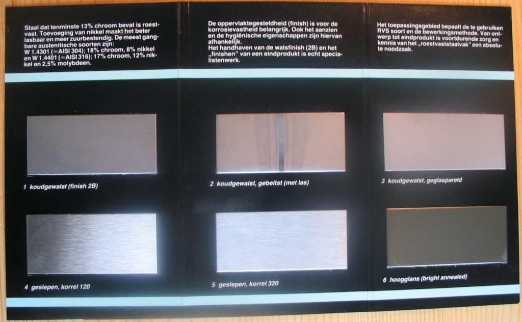 Een stalenfolder van roestvaststaalplaat